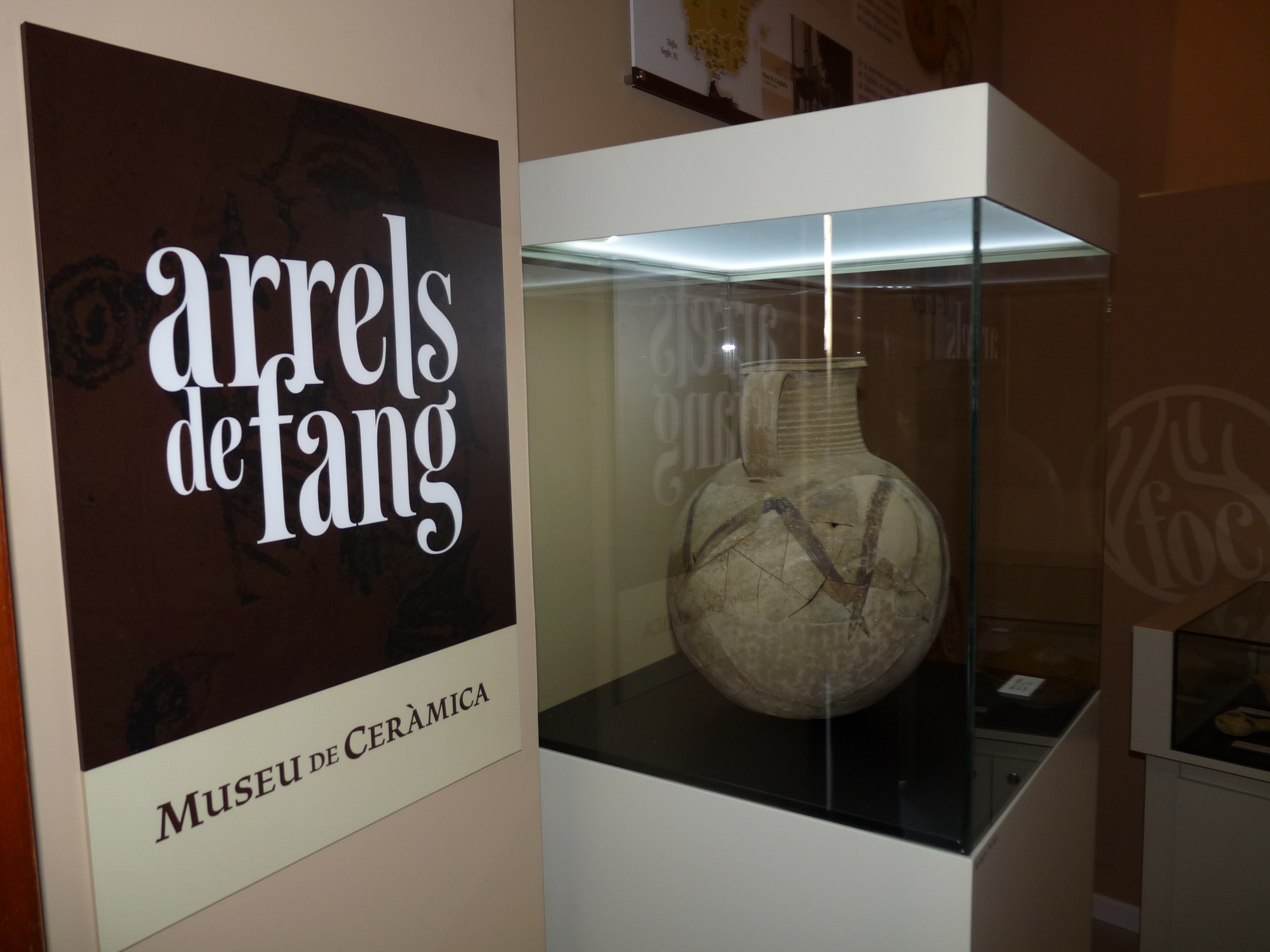 Restos arqueológicos de cerámica encontrada en Benetússer, y expuesta ahora en el museo de la localidad.